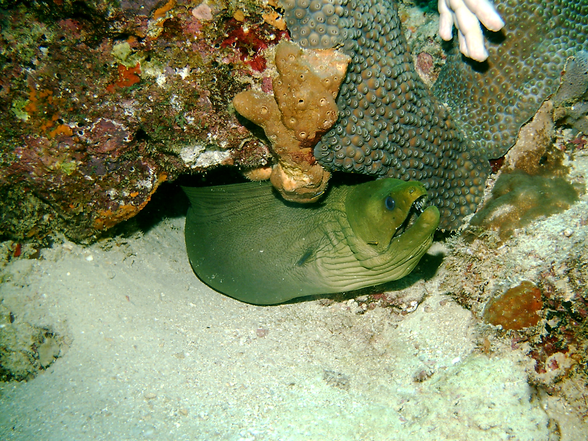 Morena Congrio en estación de desparasitación. Jul-2004. Parque Nacional Morrocoy. Tucacas. Venezuela Removed watermark read: 03.07.2004 [July 3, since summary above says July]